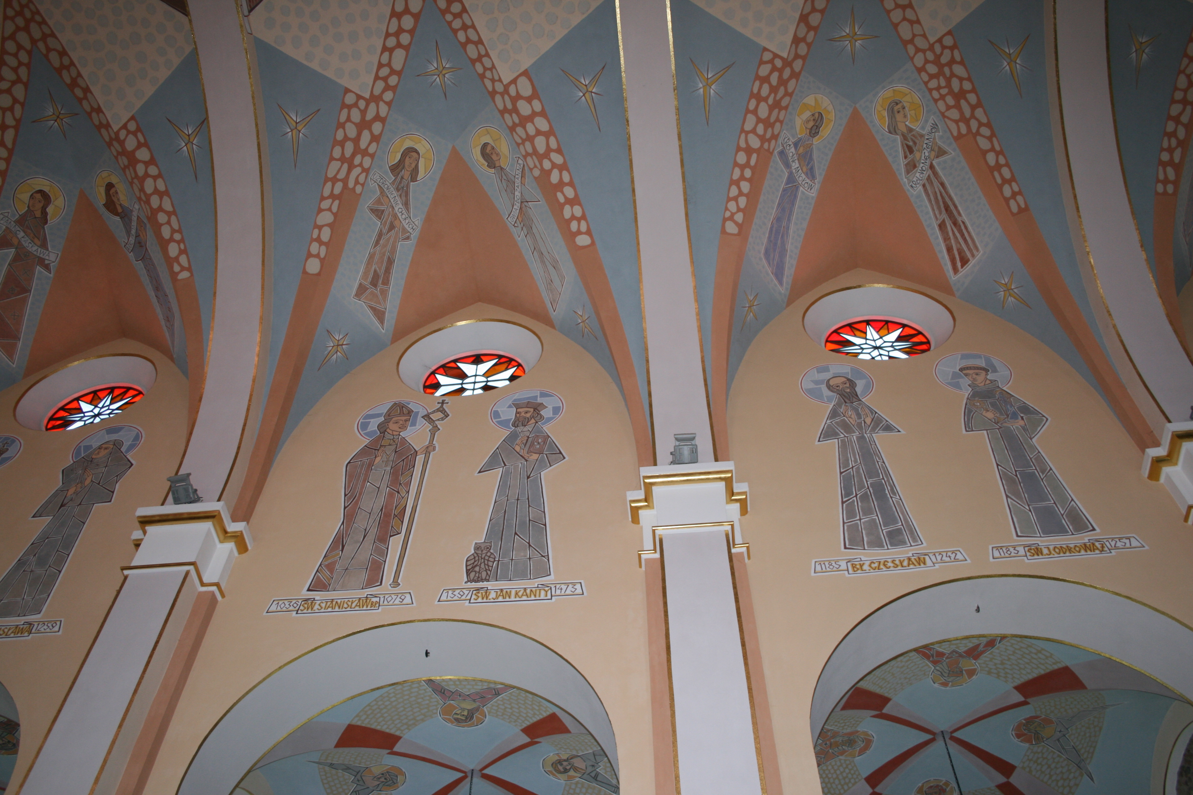 Wnętrze kościoła pw. Nawiedzenia NMB w Medyni Głogowskiej, .Projektował prof. Jan Budziło